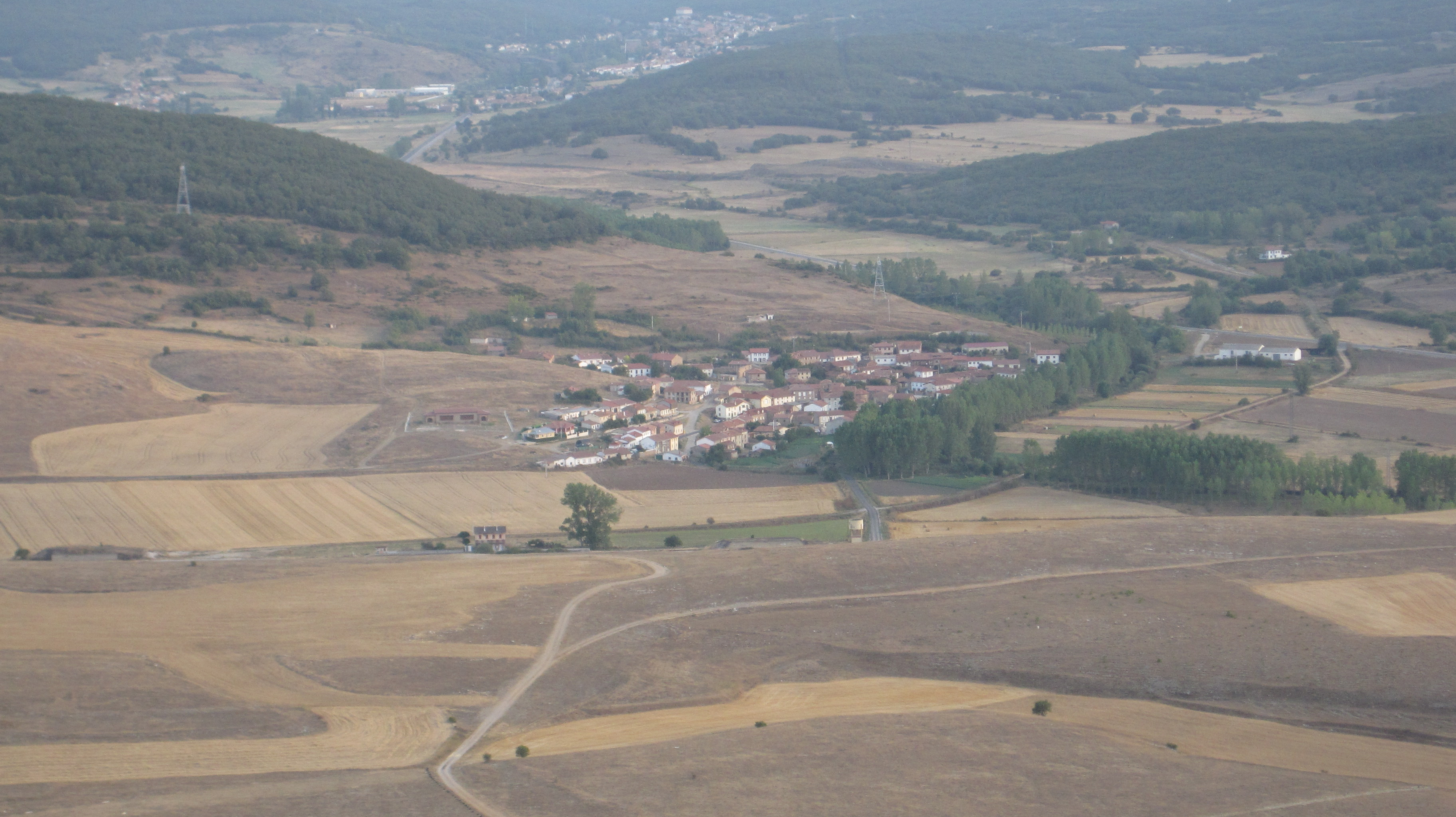 Vista aérea de Cillamayor (Barruelo de Santullán, Palencia, España).